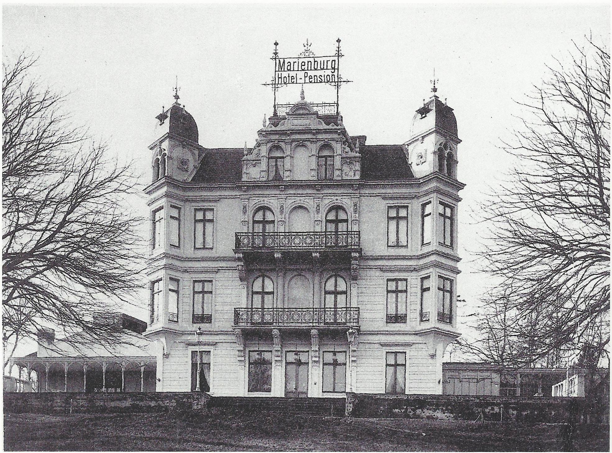 Landsitz/Villa/Gut Marienburg, Köln-Marienburg